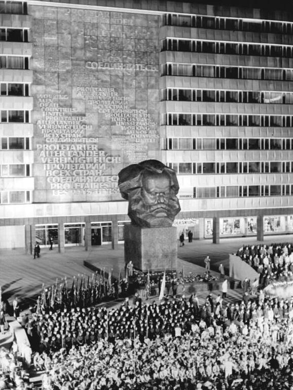 Chemnitz, Karl-Marx-Denkmal, FDJ Versammlung ADN-ZB Thieme 10.10.71 Karl-Marx-Stadt: FDJ-deating vor dem Karl-Marx-Monument- Am Abend des 9. Okt. 1971 legten 15000 Mitglieder der Pionier-Organisation und der FDJ des sächsischen Industriebezirkes vor dem am Nachmittag enthüllten Denkmal des Begründers der wissenschaftlichen Weltanschauung des Kommunismus ihr Bekenntnis zum Marxismus-Leninismus und zum sozialistischem Vaterland ab.